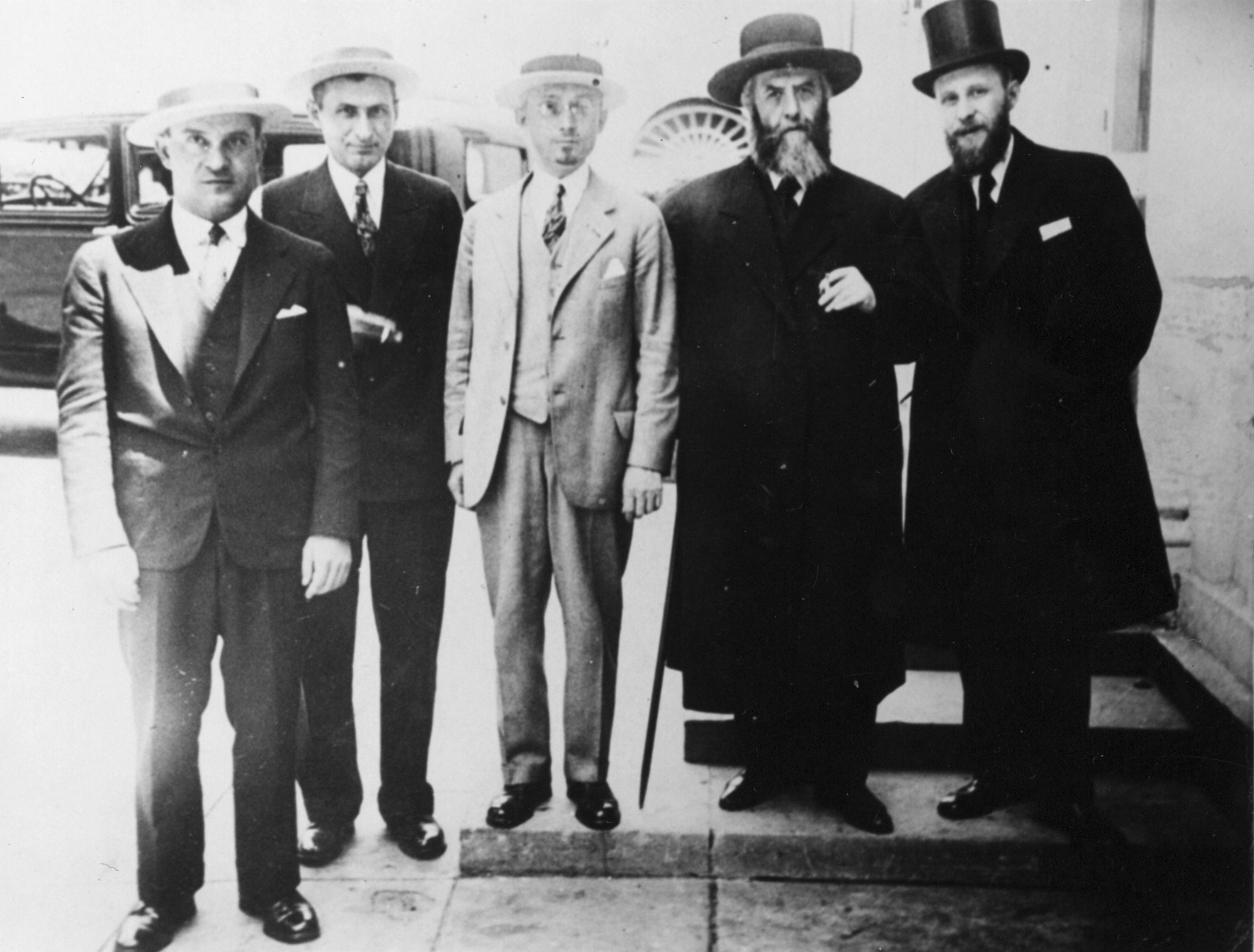 הריי"צ בביקור בשנת תר"צ בארה"ב